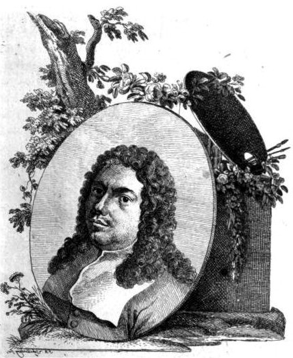 Portrait des italienisch-schweizer Malers Carpoforo Tencalla